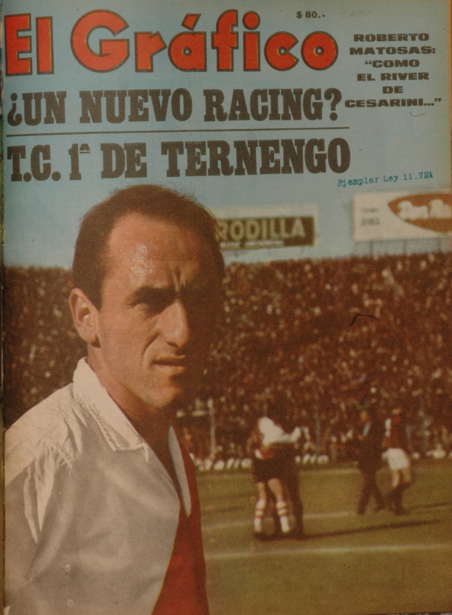 El Grafico del 27 de Junio de 1967. Edicion 2490